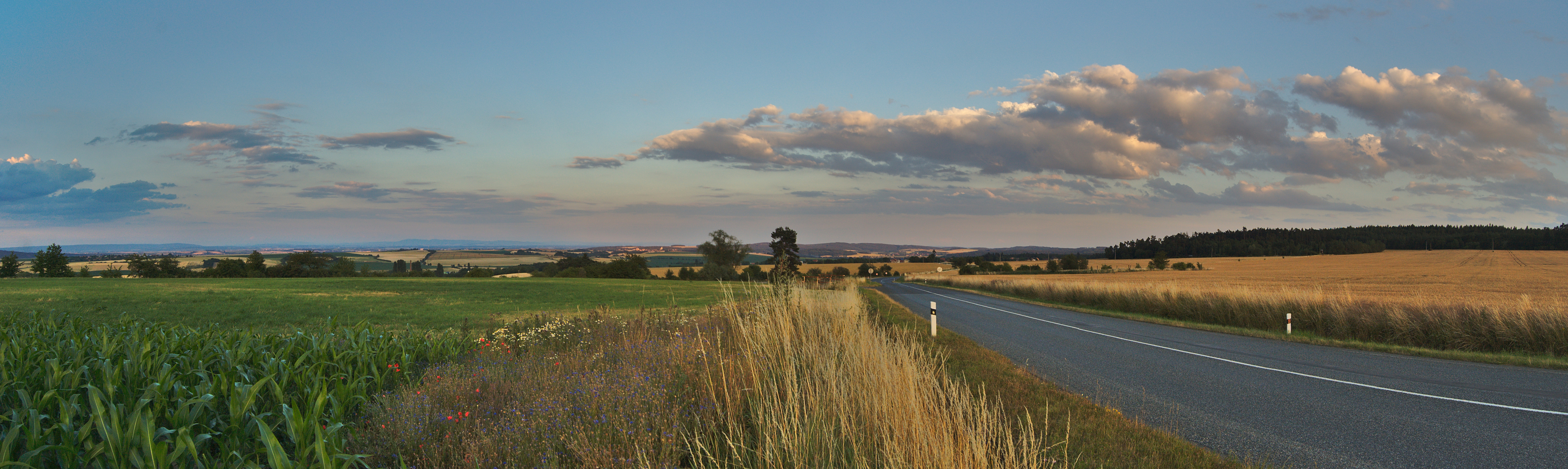 Pohled na Vícov od BTS u Holubic, okres Prostějov